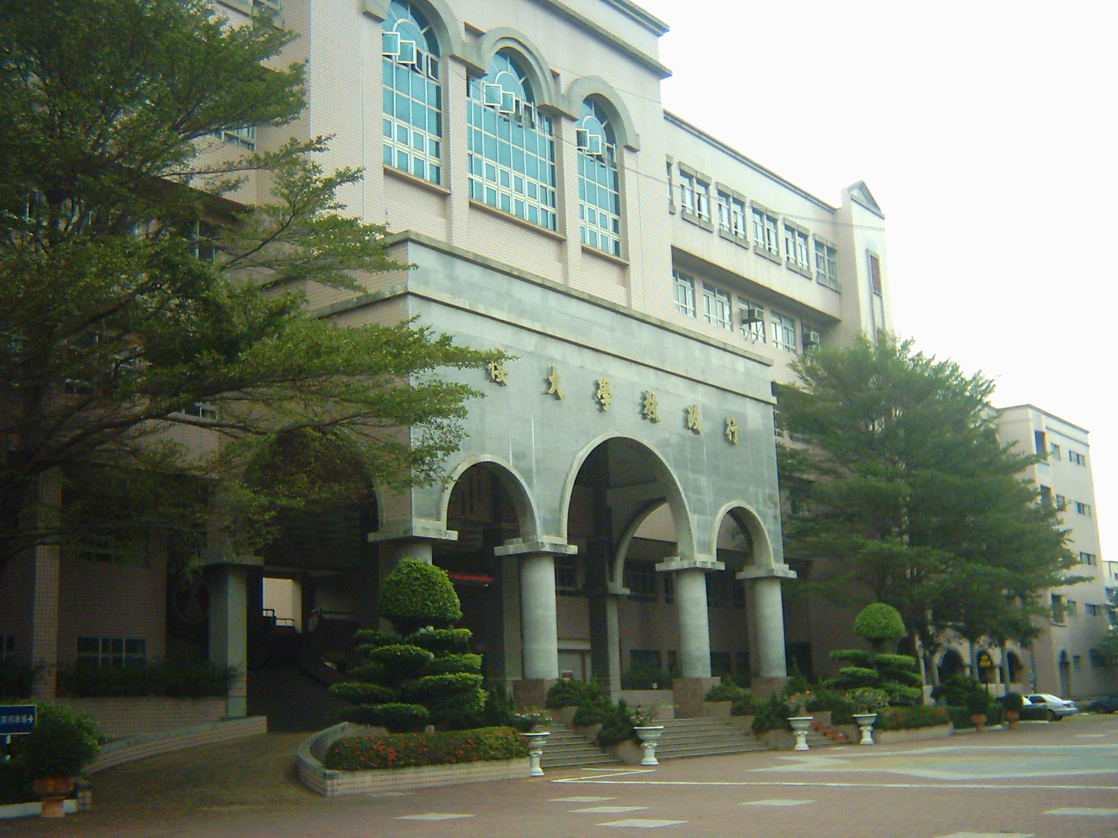 國立鳳新高級中學行政教學大樓